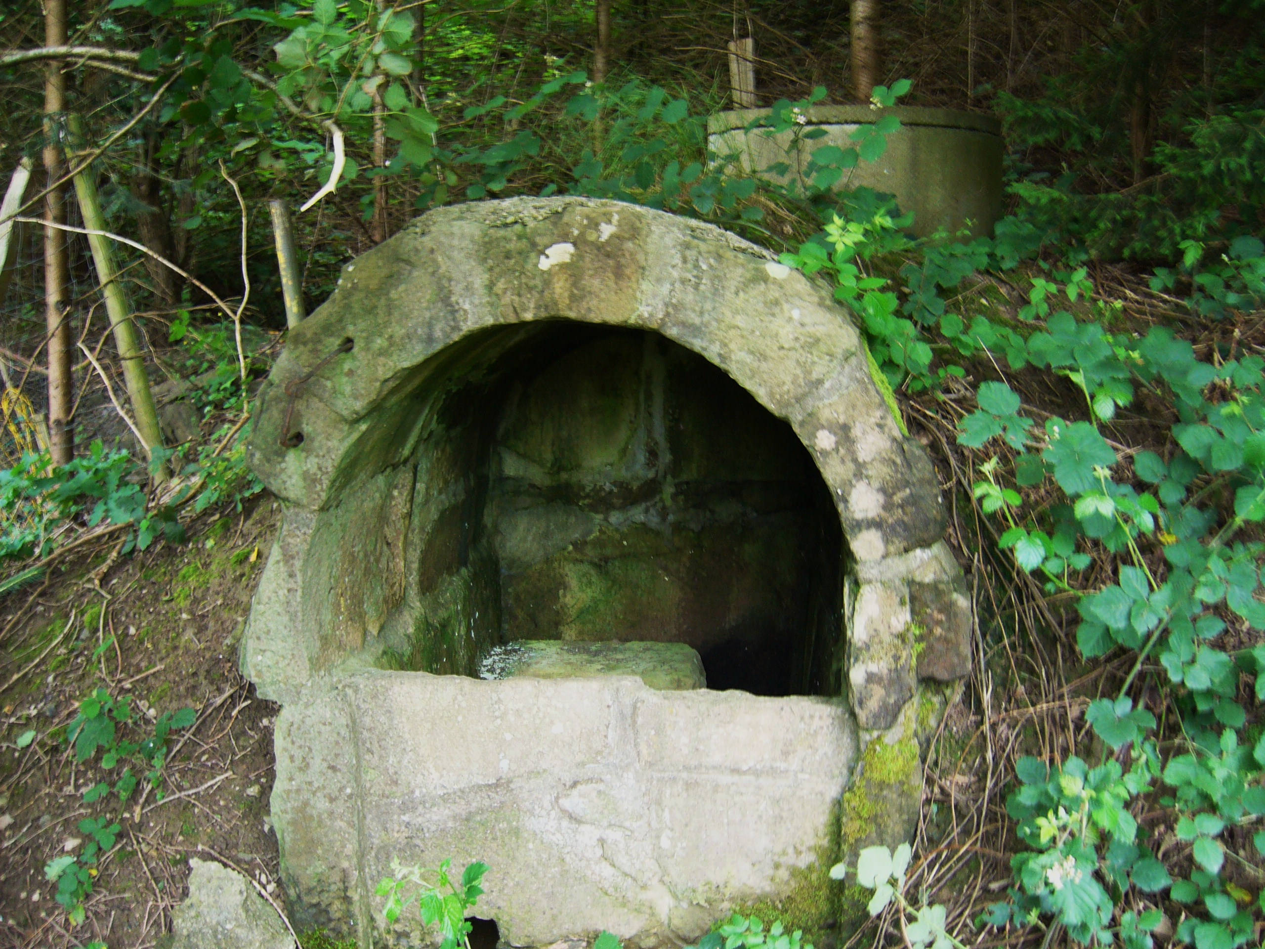 Lièpvre_013.JPG